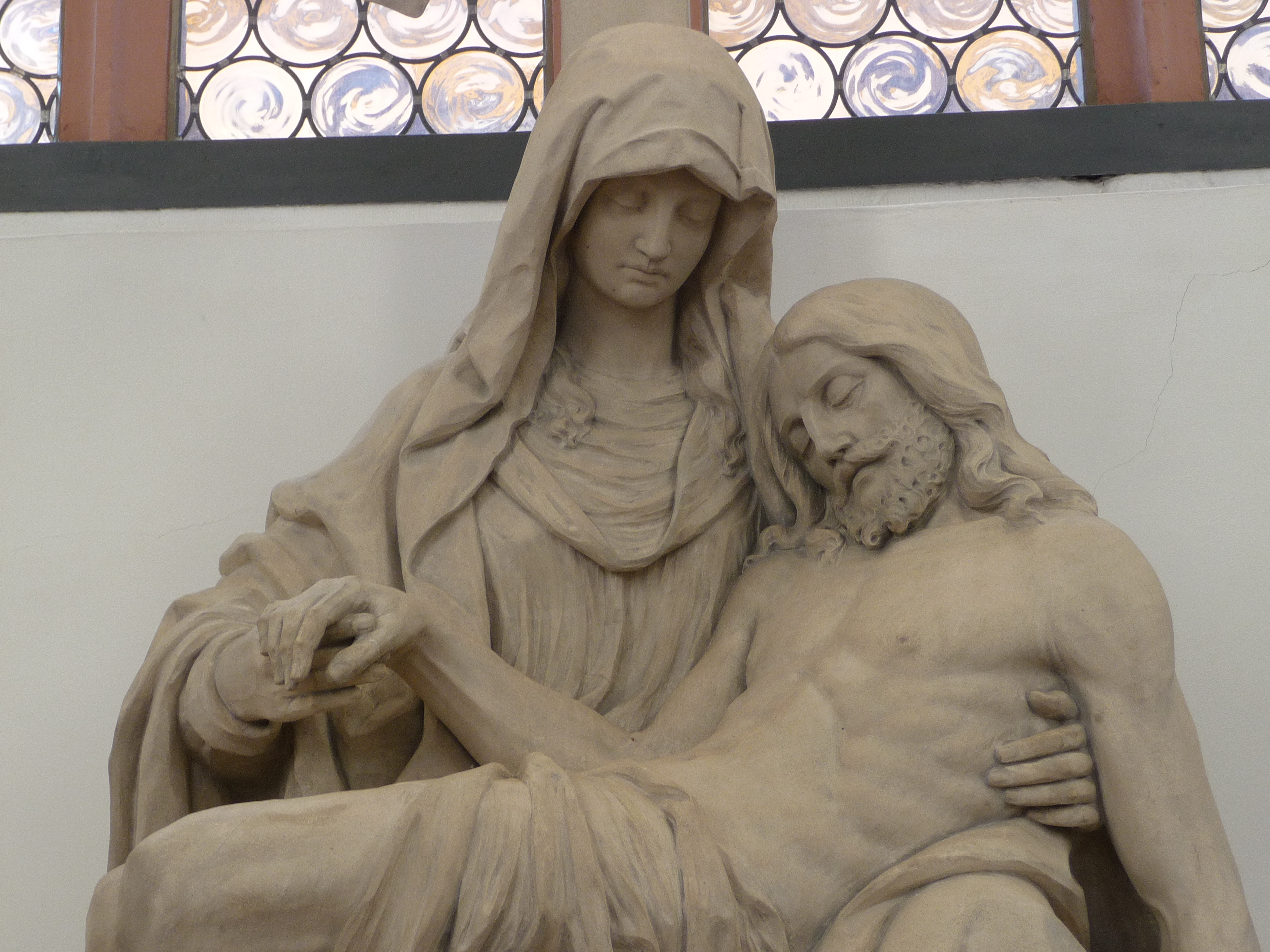 Pietà des Freiburger Bildhauers Julius Seitz aus dem Jahr 1905 in der ersten Kapelle rechts im Seitenschiff der Jesuitenkirche in Heidelberg (Baden-Württemberg, Deutschland)